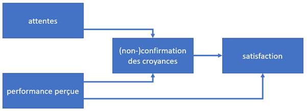 Construction de la satisfaction de l'utilisateur